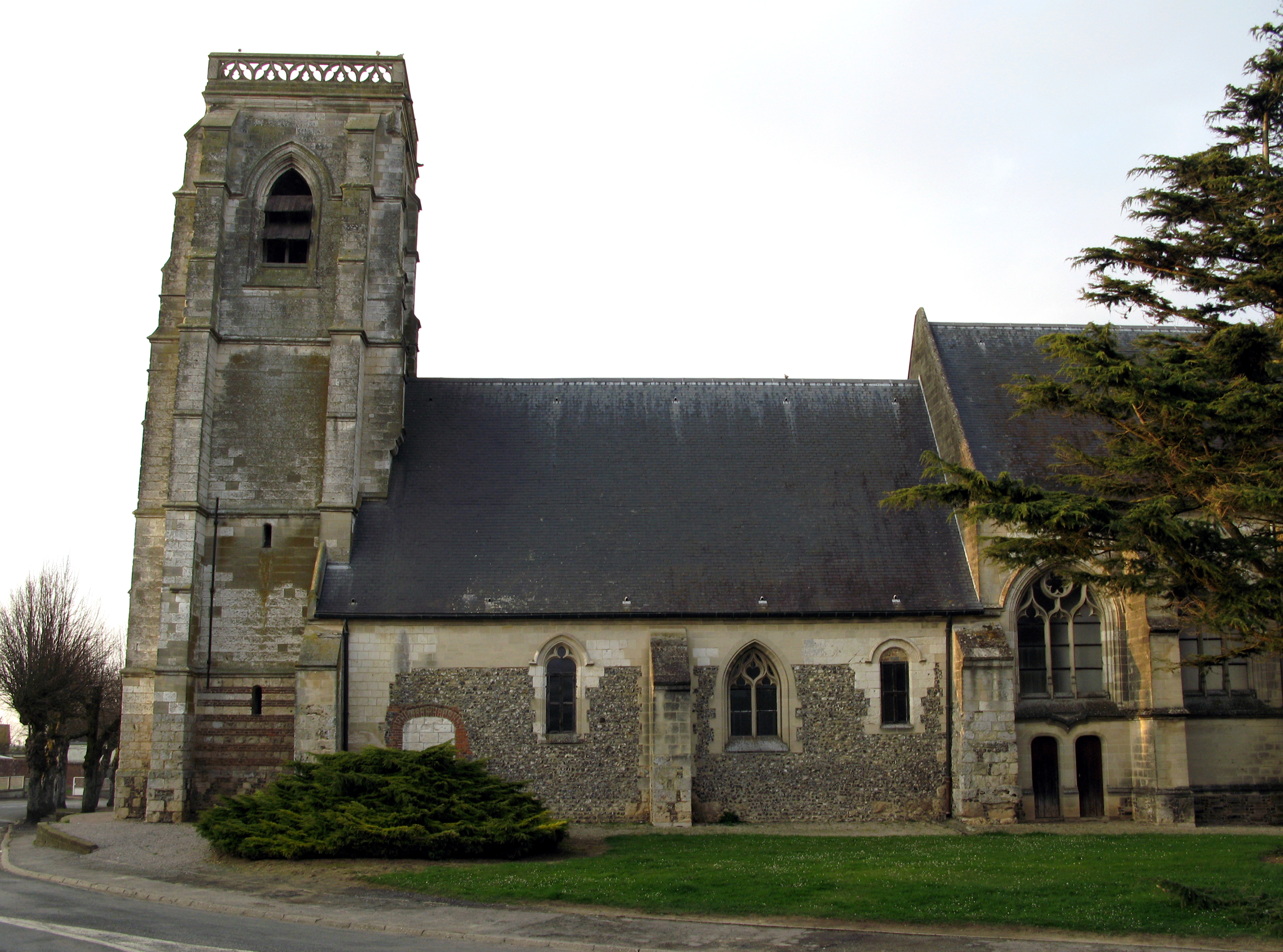 Moyenneville (Somme, France) - L'église Saint-Samson.